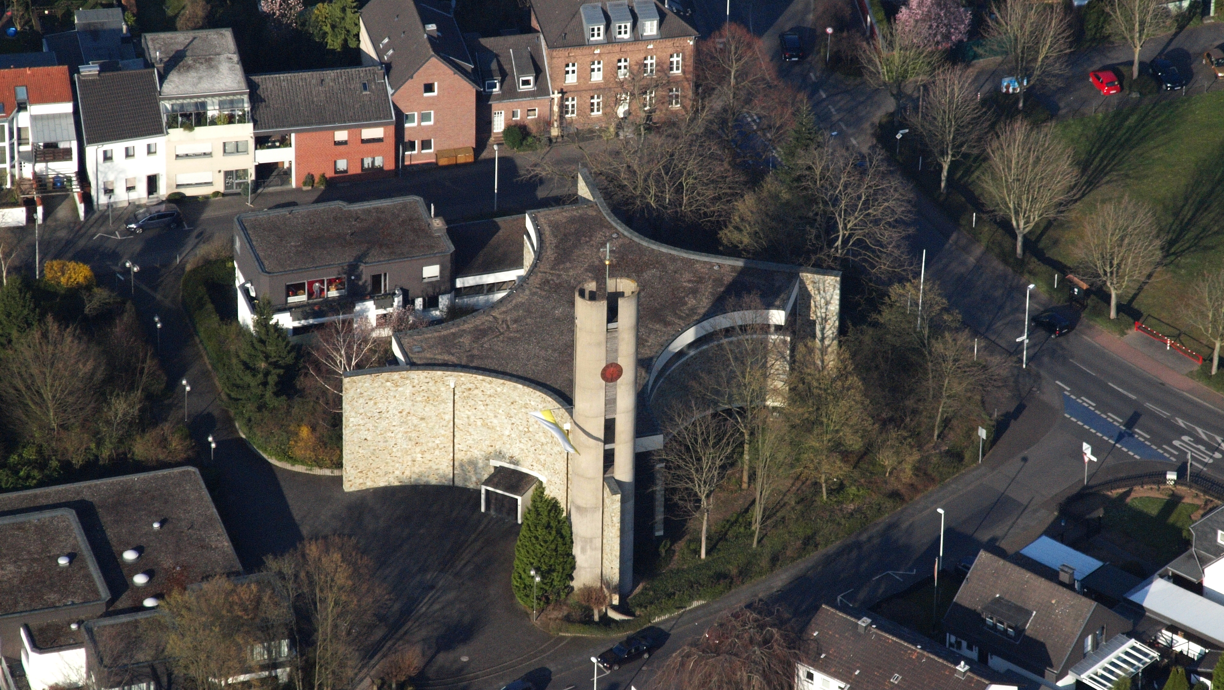 Buschdorf (Bonn), St. Aegidiuskirche, Luftaufnahme (2015)